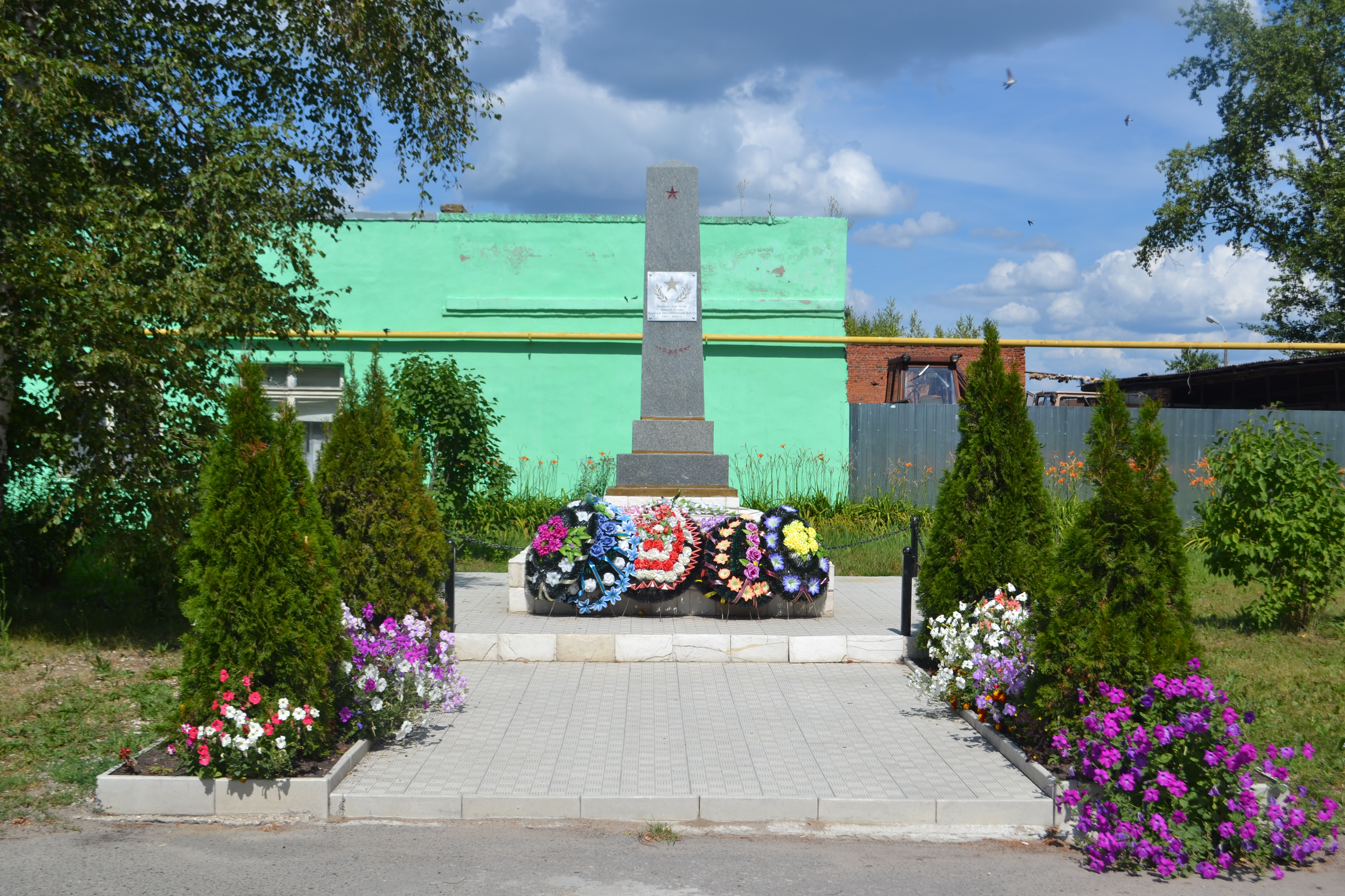 Мемориал в деревне Пышлицы (Шатурский район)